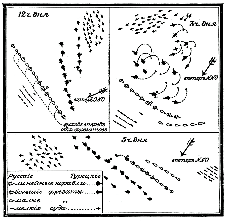 Керченское сражение (1790). Это изображение было использовано для иллюстрирования статьи «Керчь-Еникальский пролив» опубликованной в двенадцатом томе «Военной энциклопедии», который был издан книгоиздательским товариществом И. Д. Сытина в 1913 году в столице Российской империи городе Санкт-Петербурге. Более подробное описание к этой картинке можно прочесть в указанной выше статье.